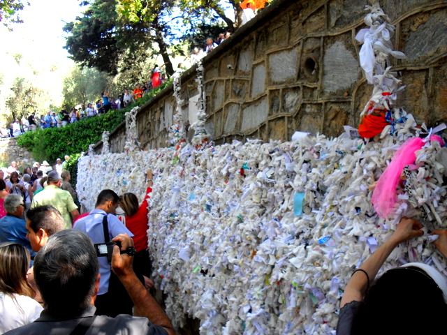 Turcja, Efez, Dom Marii Dziewicy